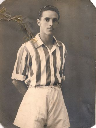 Pitilo